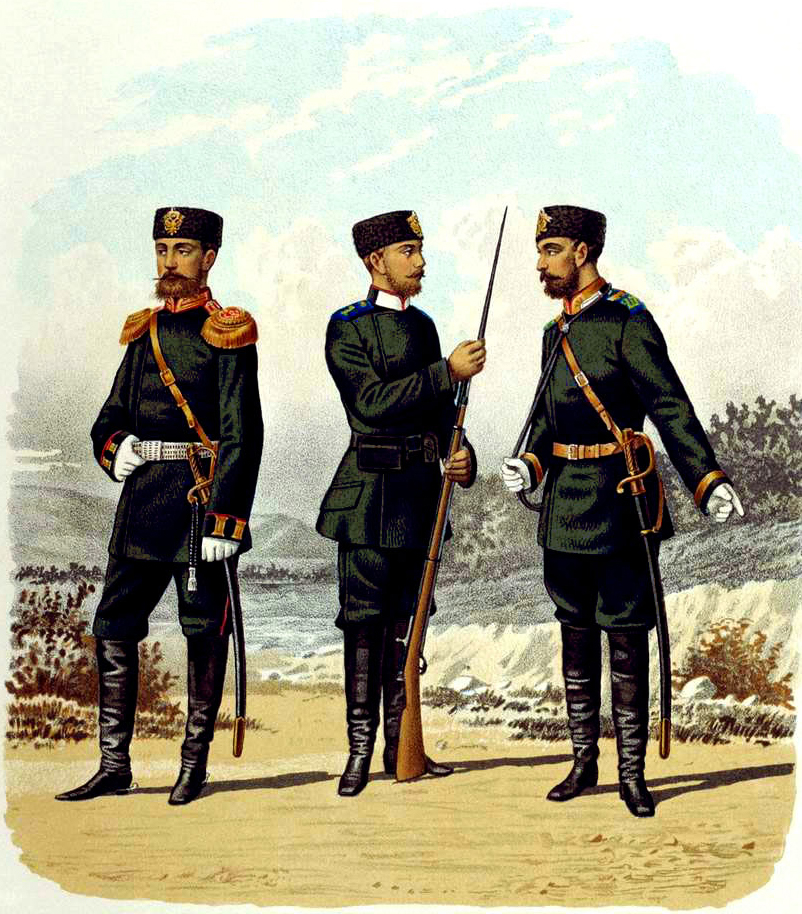 Армейские Пехотные полки. Штаб-Офицер 5-го Пех. Калужского Е.И.К.В. Императора Германского и Короля Прусского пол. ( в парадной форме ), Фельдфебель 80-го Пех. Кабардинского Ген. Фельдмаршала Кн. Барятинского полка ( в парадной строевой форме ) и Рядовой 3-го пех. Нарвского Ген. Фельд. Кн. Воронцова п. ( в парадной строевой форме ). ( прик. по воен. вед. 1881 г. № 313 )